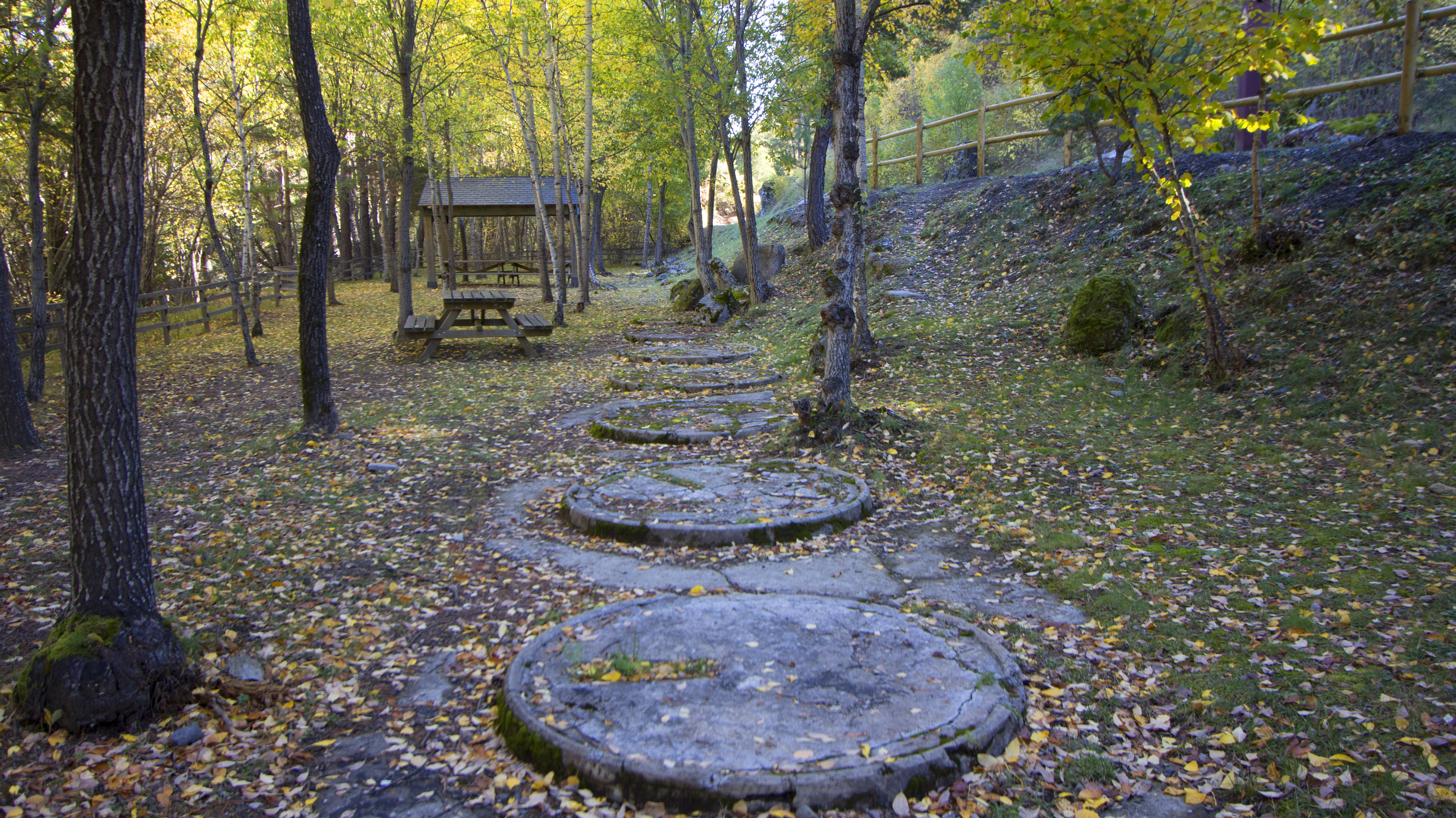 Àrea d'esbarjo ubicada a l'antiga ubicació de la "fàbrica de tubs" de la CH Espot (Pallars Sobirà)